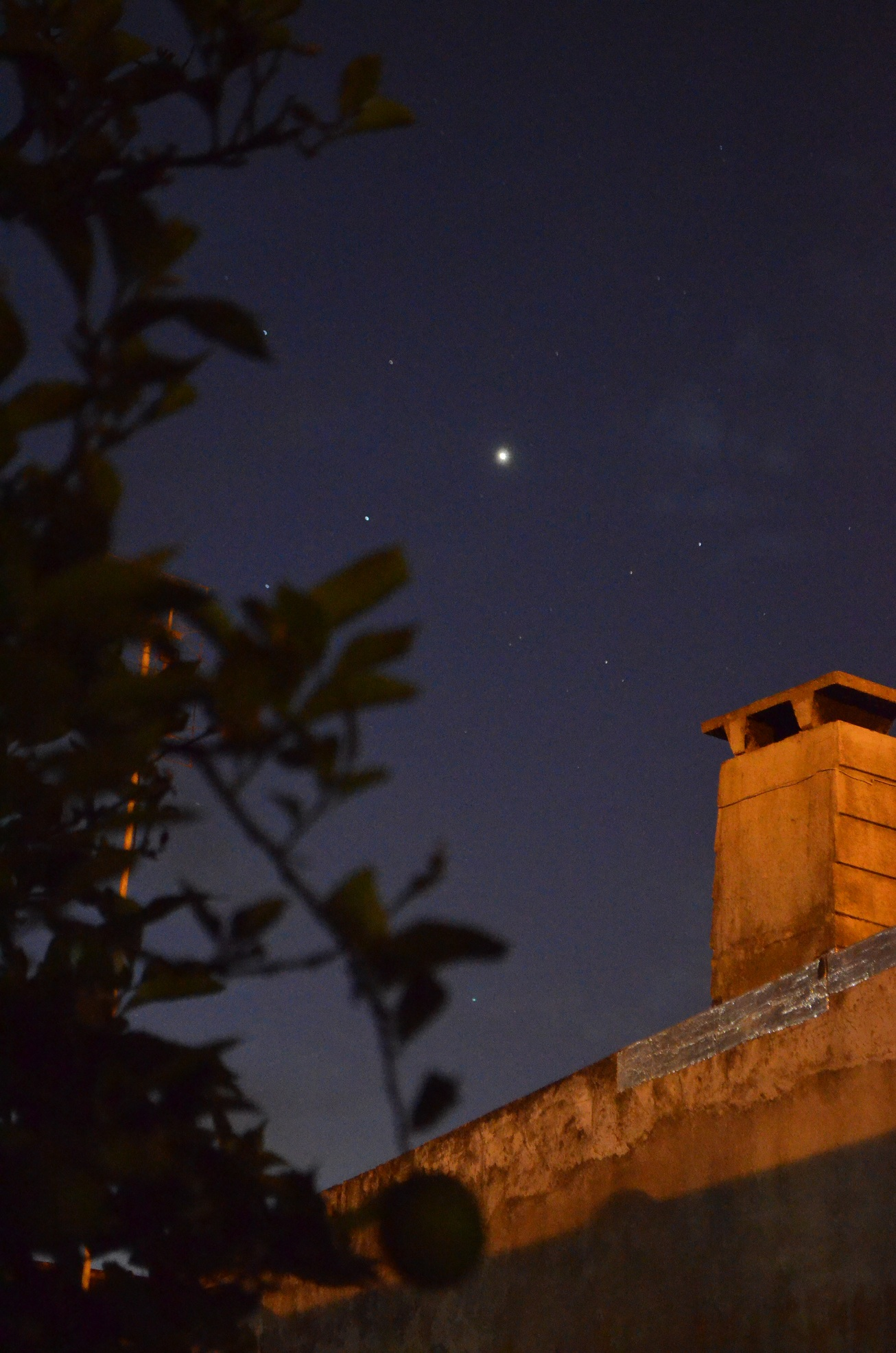 El Lucero de la tarde, Venus, observado desde Mar del Plata, Argentina, fotografía realizada el 25-11-2016. Por Esteban J. Andrada